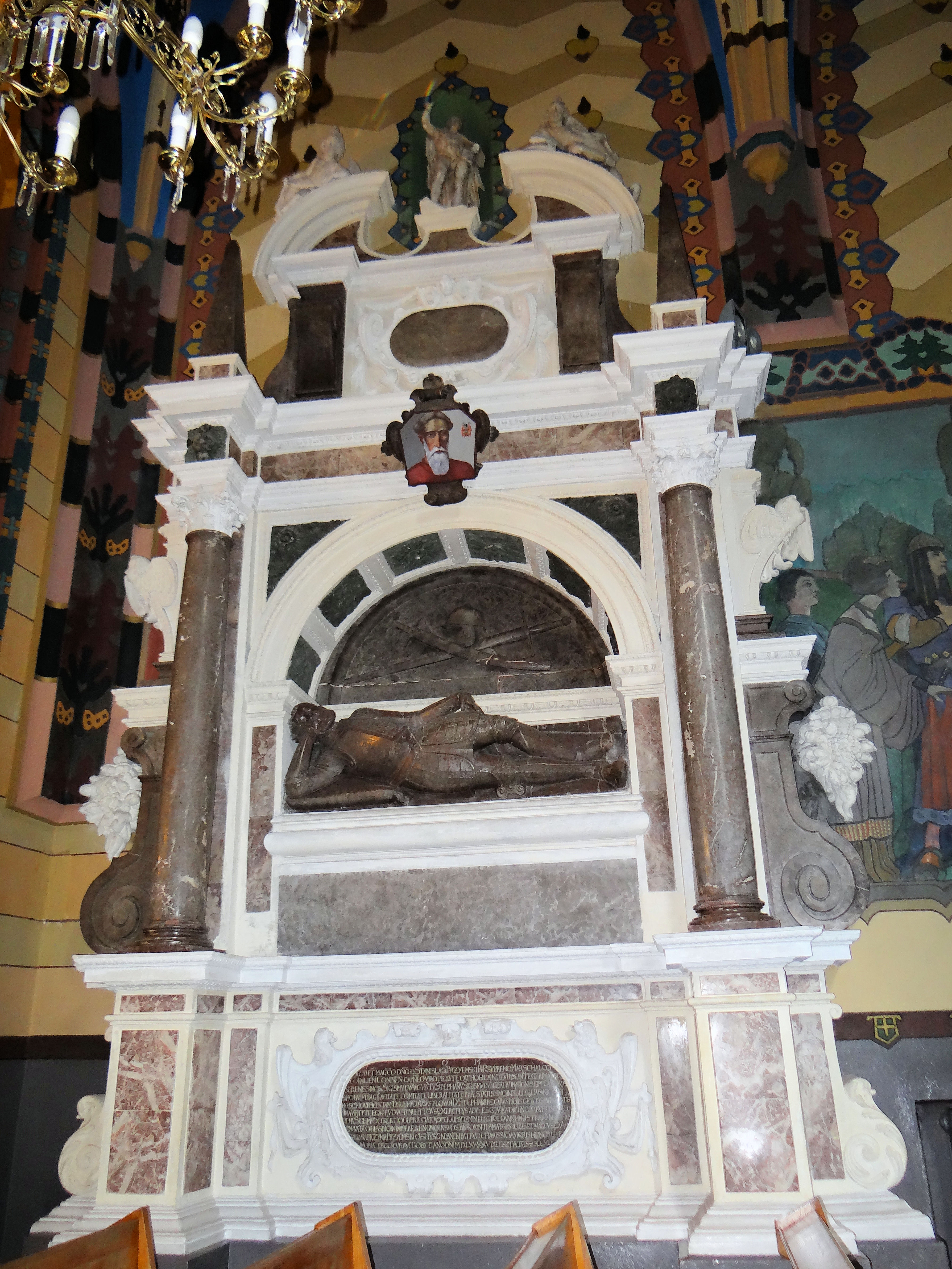 Nagrobek w kościele p.w. św Bartłomieja Apostoła w Koninie